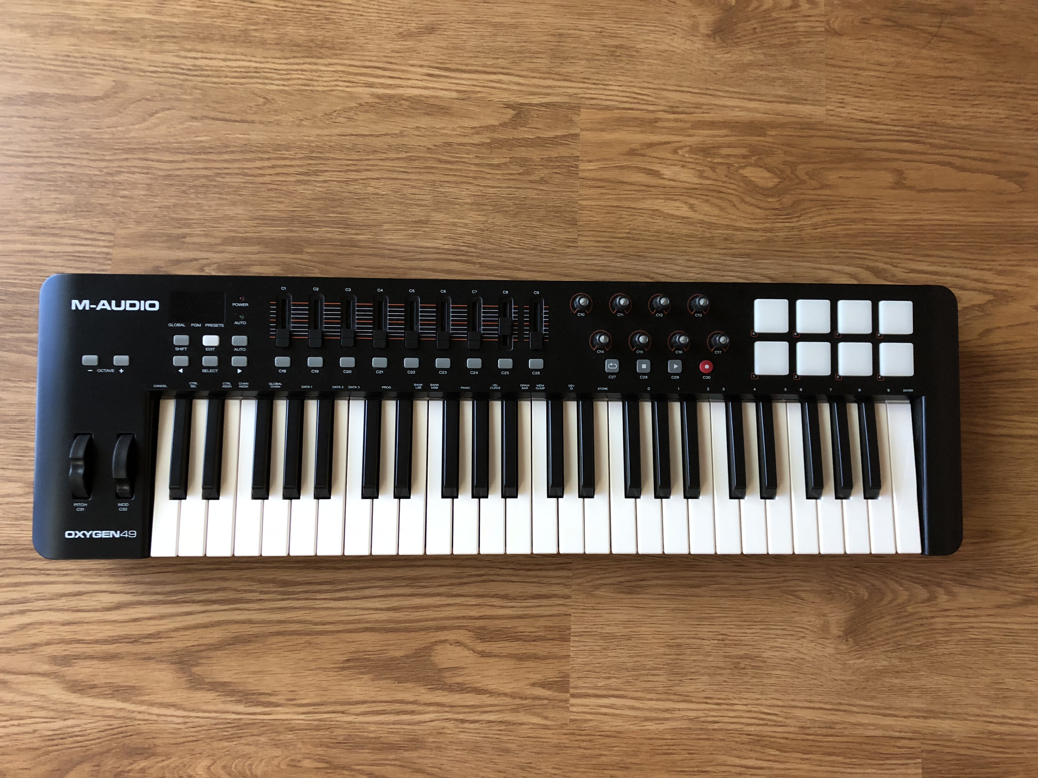 M-Audio Oxygen 49